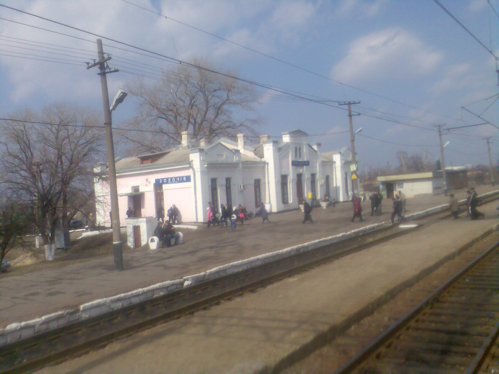 Золочів (станція, Південна залізниця)